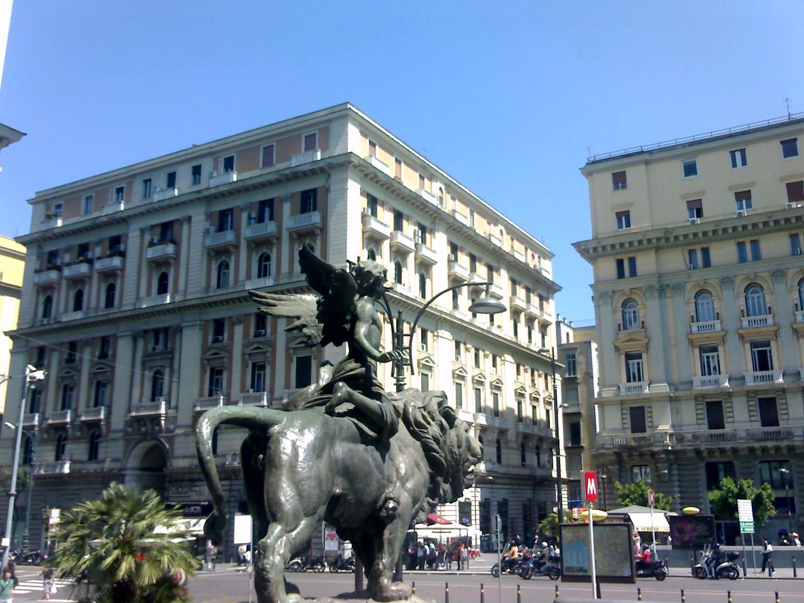 Napoli, Piazza Borsa (o Giovanni Bovio)